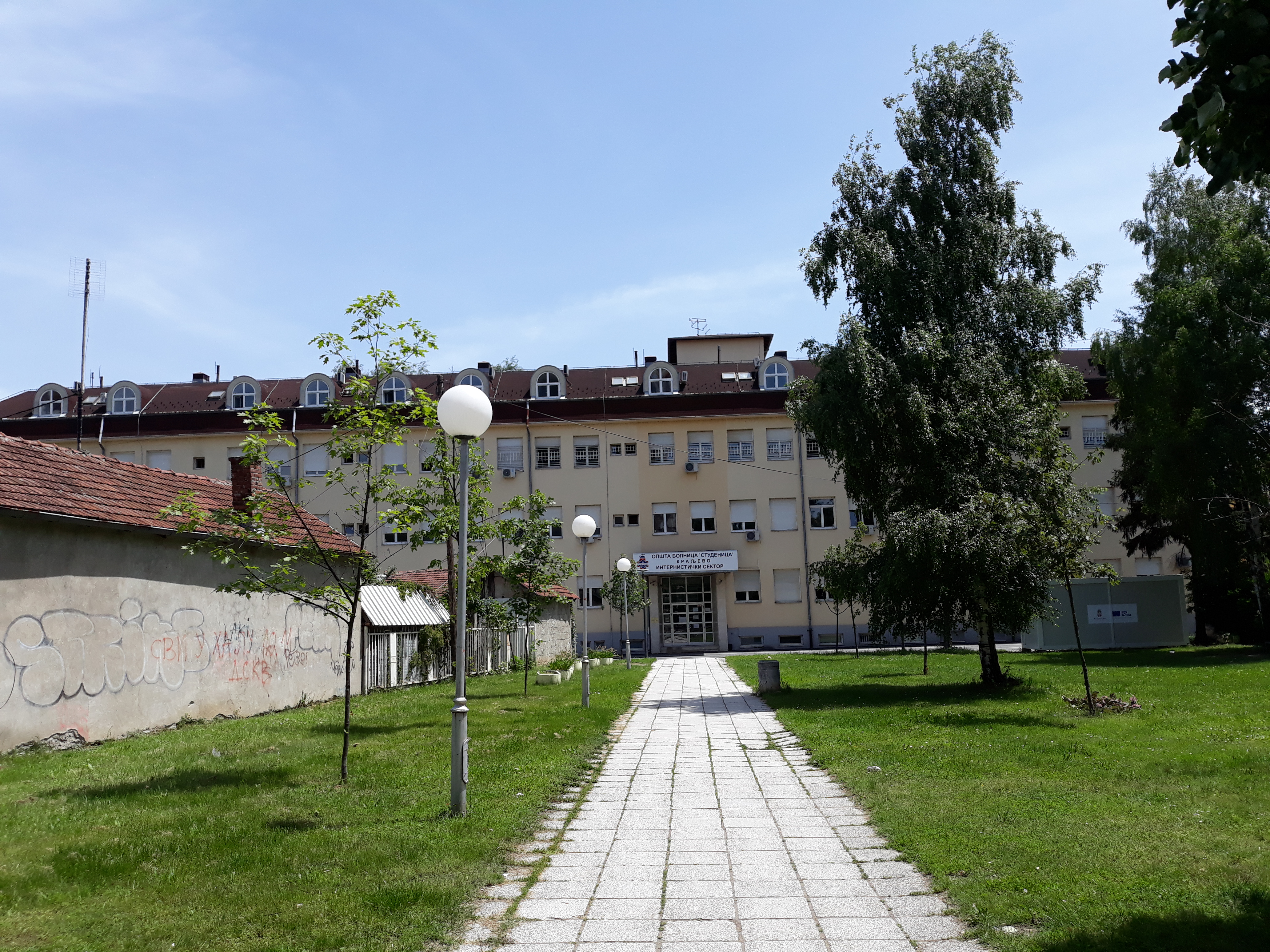 Општа болница Краљево